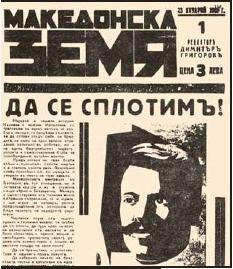 Вестник „Македонска земя“.